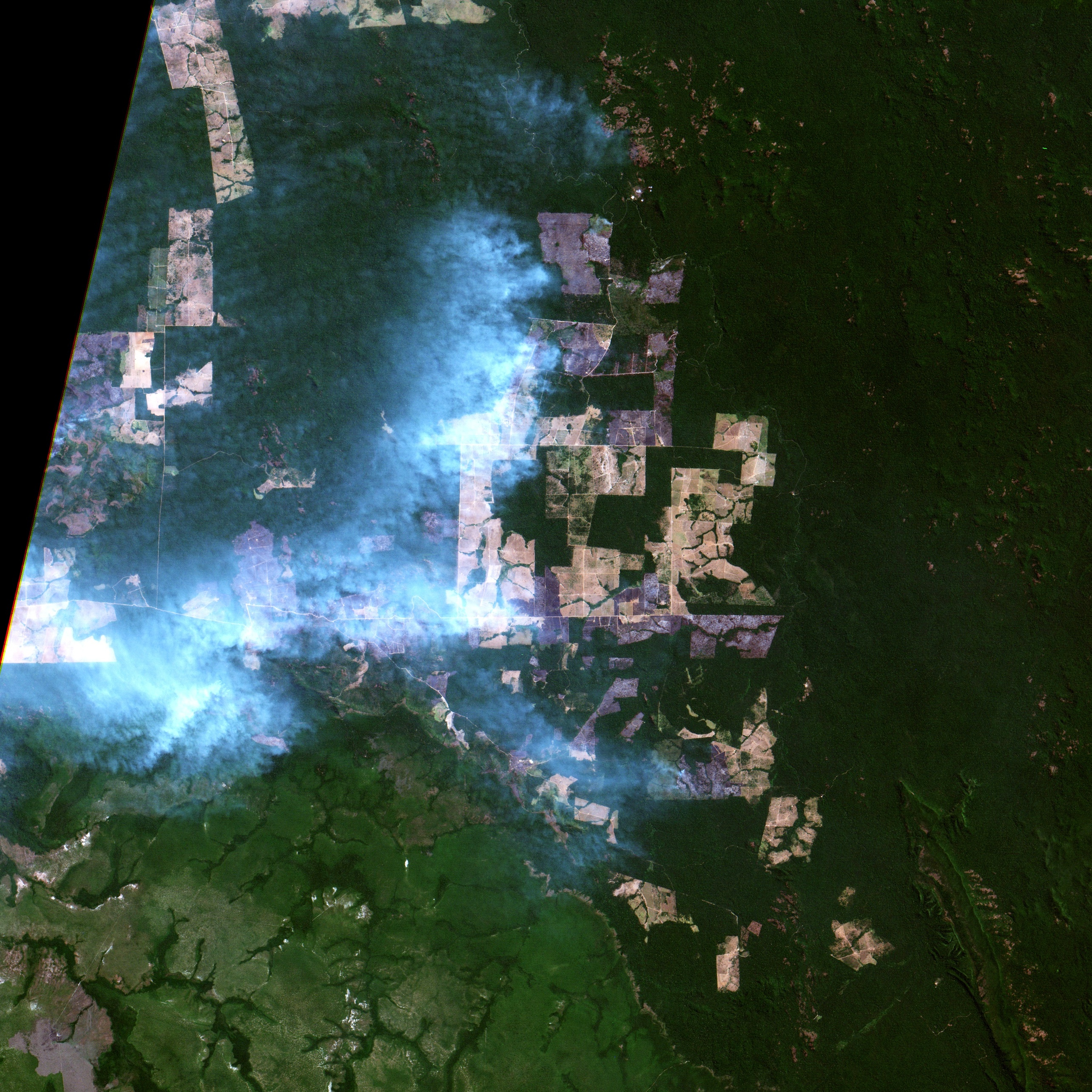 brazil fire satellite aug 22